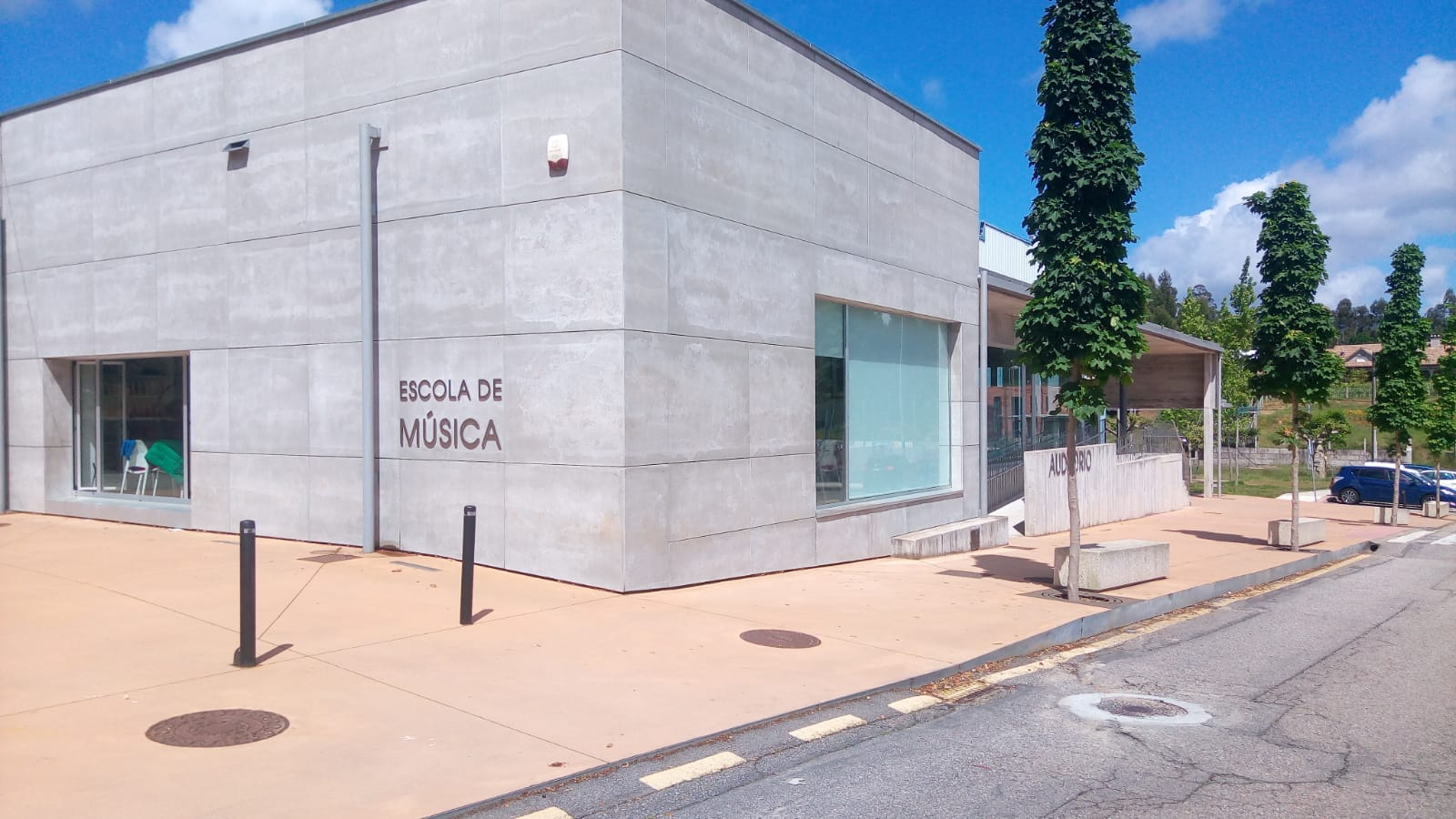 Auditorio de Goián no que ensaia a Agrupación Musical de Goián